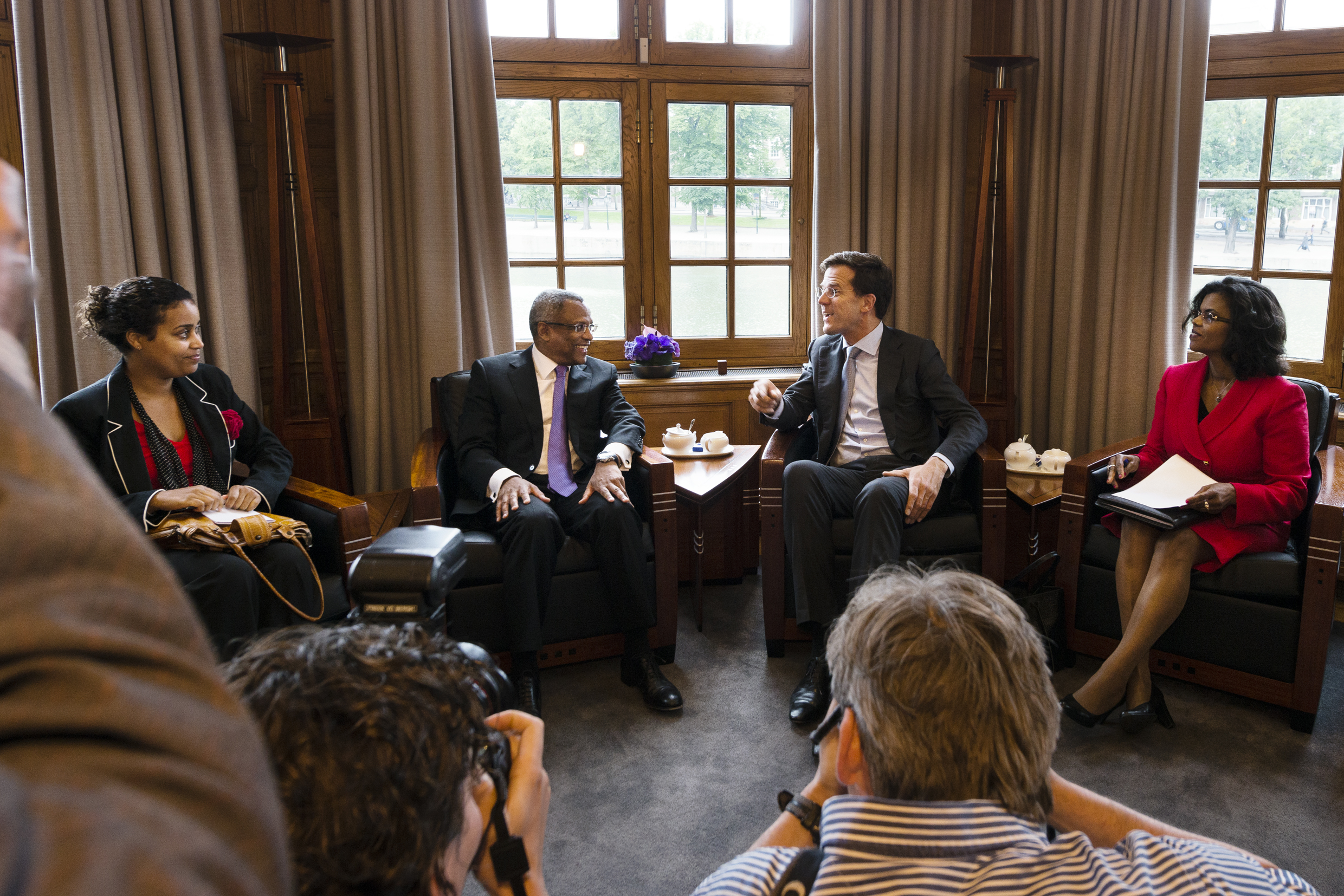 Premier Rutte spreekt in het Torentje met minister-president Neves van Kaapverdië. Het bezoek van de eerste minister van Kaapverdië aan Nederland staat in het teken van de bilaterale en economische betrekkingen.